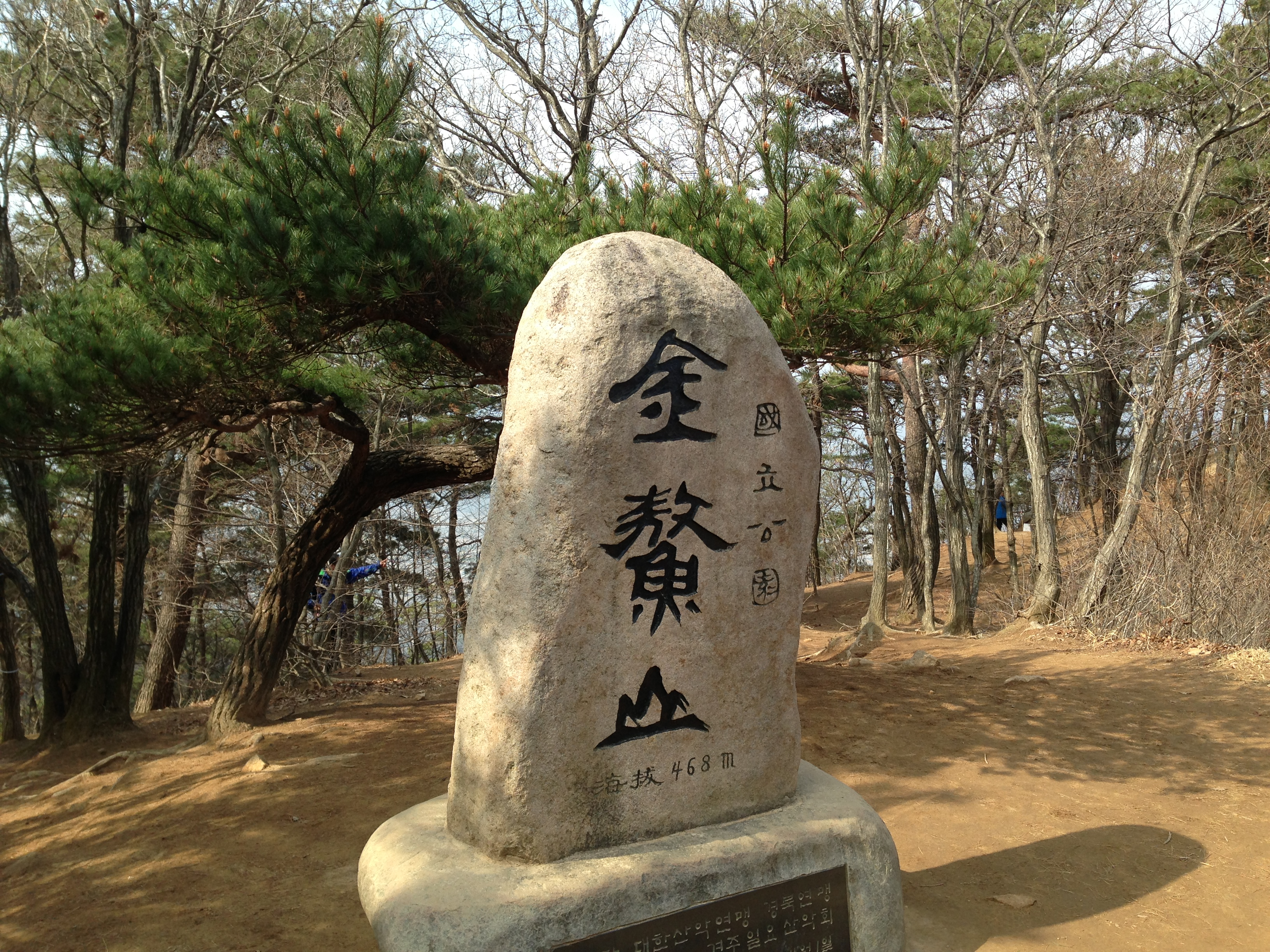 경주 남산 금오봉 정상